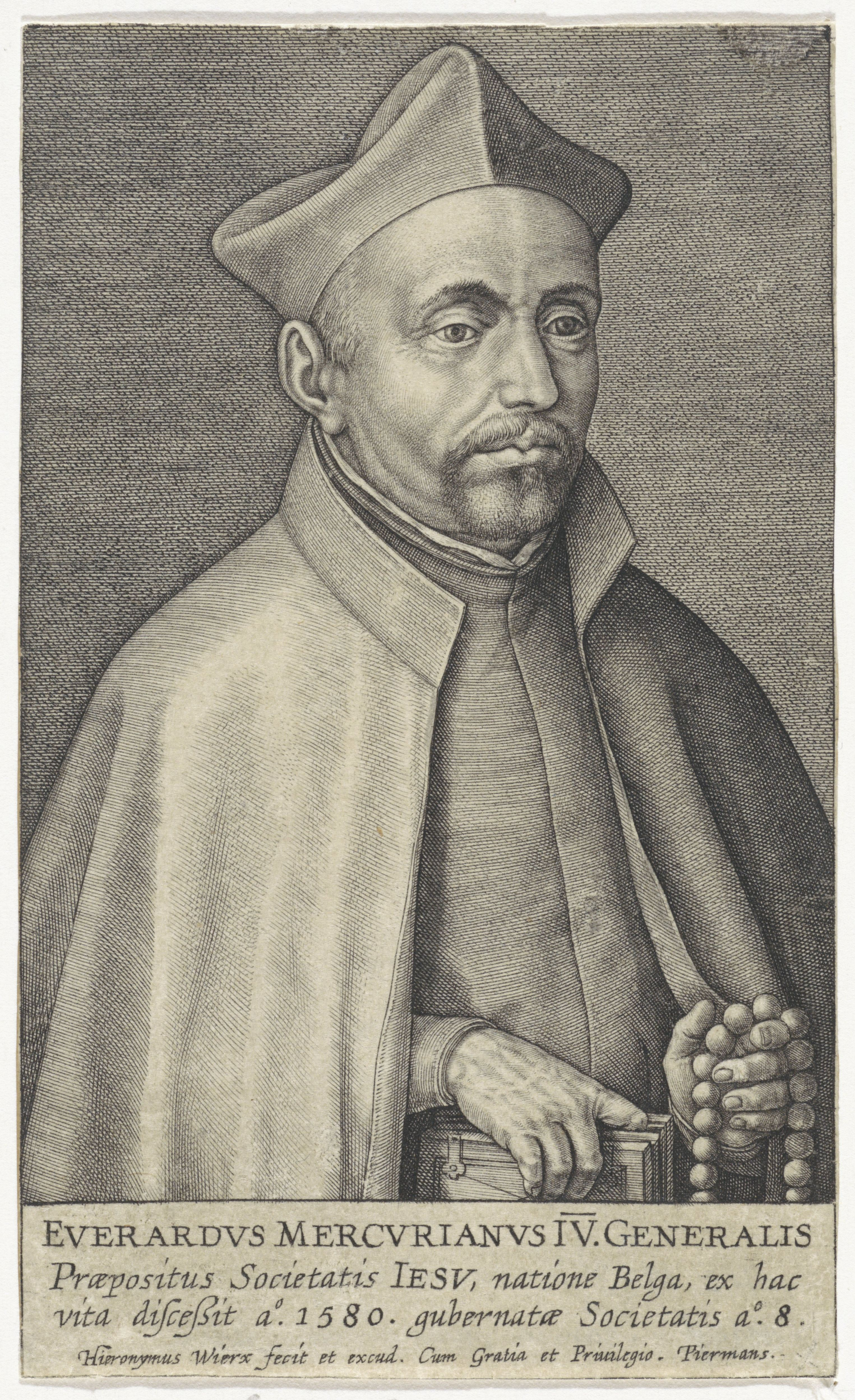 IdentificatieTitel(s): Portret van de jezuïet Everardus MercurianusPortretten van generaal oversten van de jezuïeten (serietitel)Effigies præpositorvm generalivm societatis Iesv (serietitel)Objecttype: prent Objectnummer: RP-P-1907-3912Catalogusreferentie: Hollstein Dutch 2018Van Someren 3596-*Opschriften / Merken: verzamelaarsmerk, verso onder, gestempeld: Lugt 2228Omschrijving: Portret van de jezuïet Everardus Mercurianus, in zijn handen een bijbel en een rozenkrans. In de marge een drieregelig onderschrift in het Latijn.VervaardigingVervaardiger: prentmaker: Hieronymus Wie: rix (vermeld op object)uitgever: Hieronymus Wierix (vermeld op object)verlener van privilege: Piermans (vermeld op object)Plaats vervaardiging: AntwerpenDatering: 1615 - 1619Fysieke kenmerken: gravureMateriaal: papier Techniek: graveren (drukprocedé)Afmetingen: blad: h 117 mm × b 71 mmOnderwerpWat: the Bible as a bookaids for prayer, e.g. rosaryWieEverardus MercurianusVerwerving en rechtenVerwerving: aankoop 1907Copyright: Publiek domein